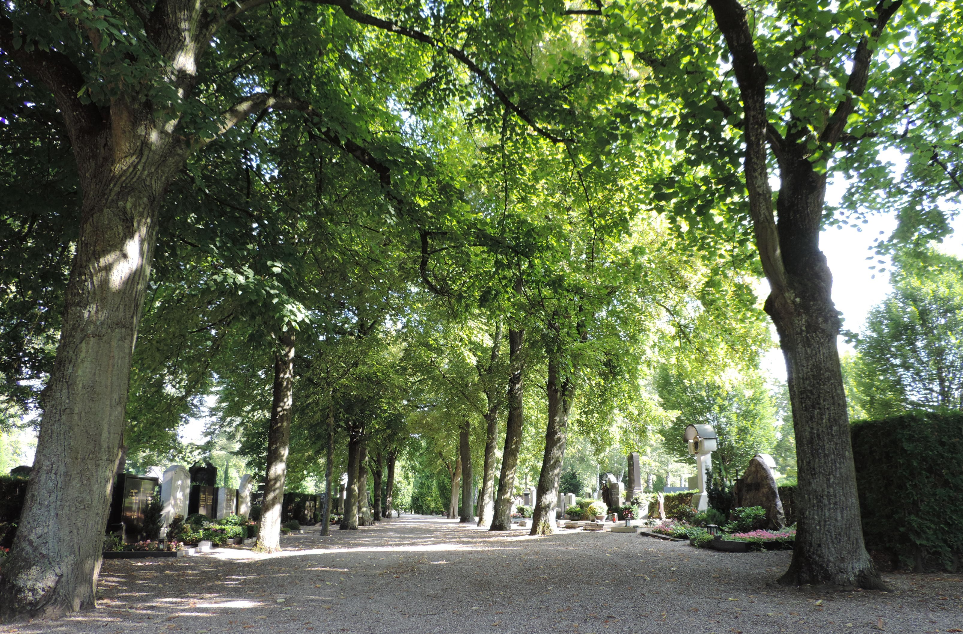 Westfriedhof Ingolstadt Manfi.B. 19. August 2014